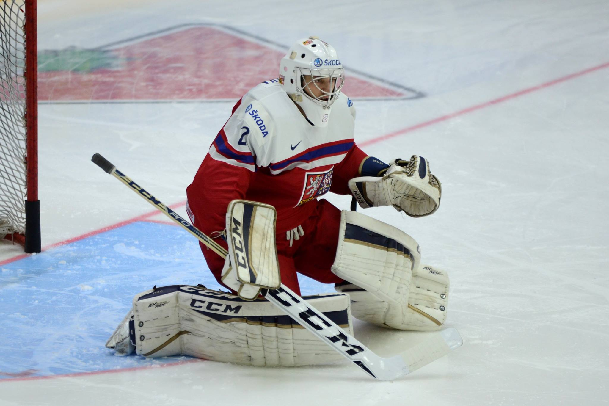 Aleš v zápase na MSU20 v semifinále proti výběru USA